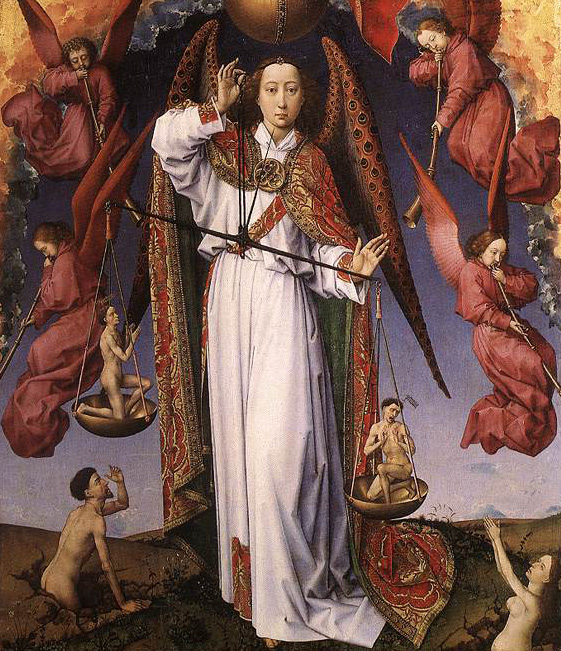 Altar des Jüngsten Gerichtes in Beaune, Mittelteil, geöffneter Altar